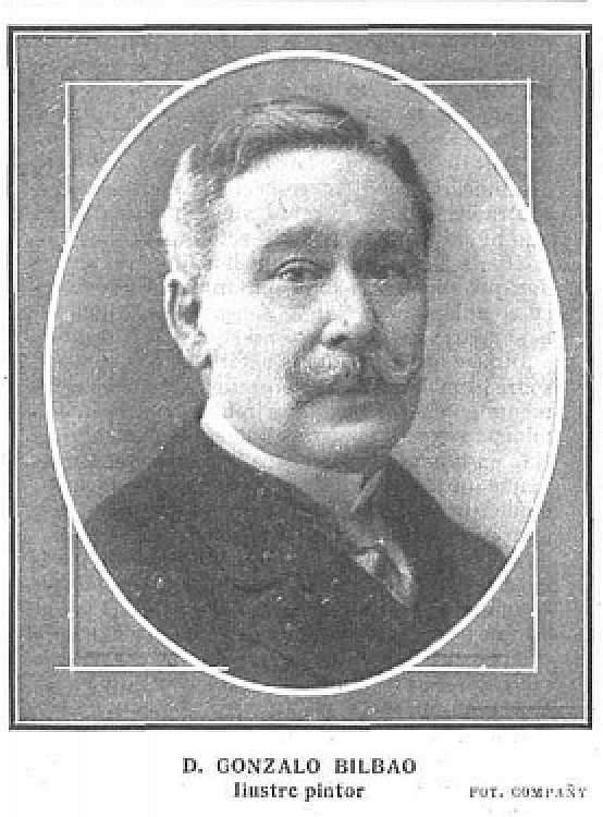 Gonzalo Bilbao; pintor.